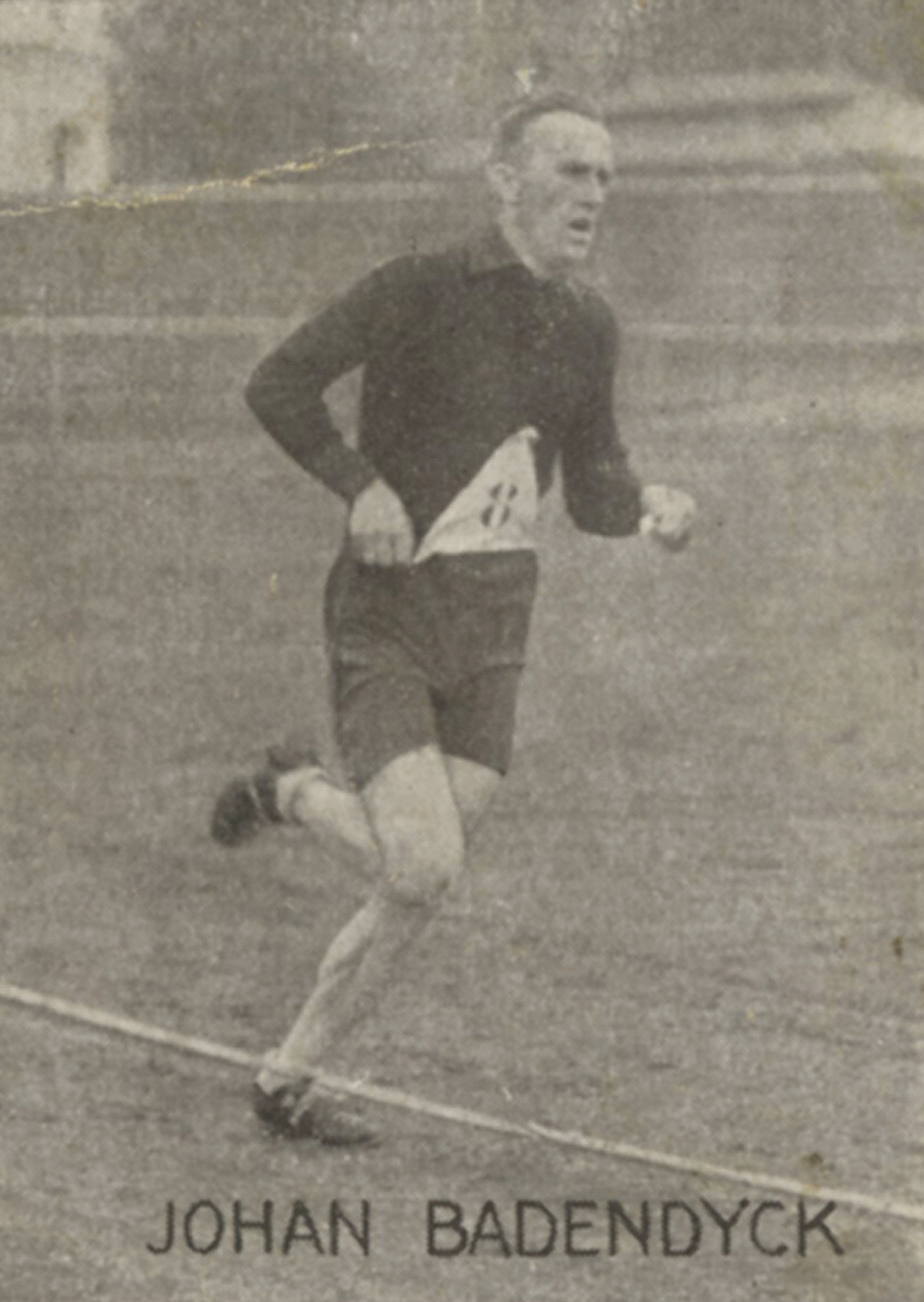 Format: Samlekort Dato / Date: ca. 1930 (dokumentet) Fotograf / Photographer: Ukjent Wikipedia: Johan Badendyck (1902 - 1973) Eier / Owner Institution: Trondheim byarkiv, The Municipal Archives of Trondheim Arkivreferanse / Archive reference: Sportsklubben Freidig: Sigarettfoto ca. 1930 (Løpenr. 75) F23941 Tekst på baksiden: Johan Badendyck, Norges fremragende langdistanceløper og terrengmester. Han har vundet en række krævende løp og er vor ubestridt bedste løper over lange distancer. Merknad: Disse samlekortene med bilder av norske og internasjonale idretthelter fulgte med i sigarettpakker på 1920 og 30-tallet - derav tobakksreklamen på baksiden. Samlekortene kommer fra Sportsklubben Freidigs arkiv, og inneholder nærmere 90 unike kort pent plassert i et samlealbum. Samleren var den senere skipsmegler Finn Følling (1914 – 1985).